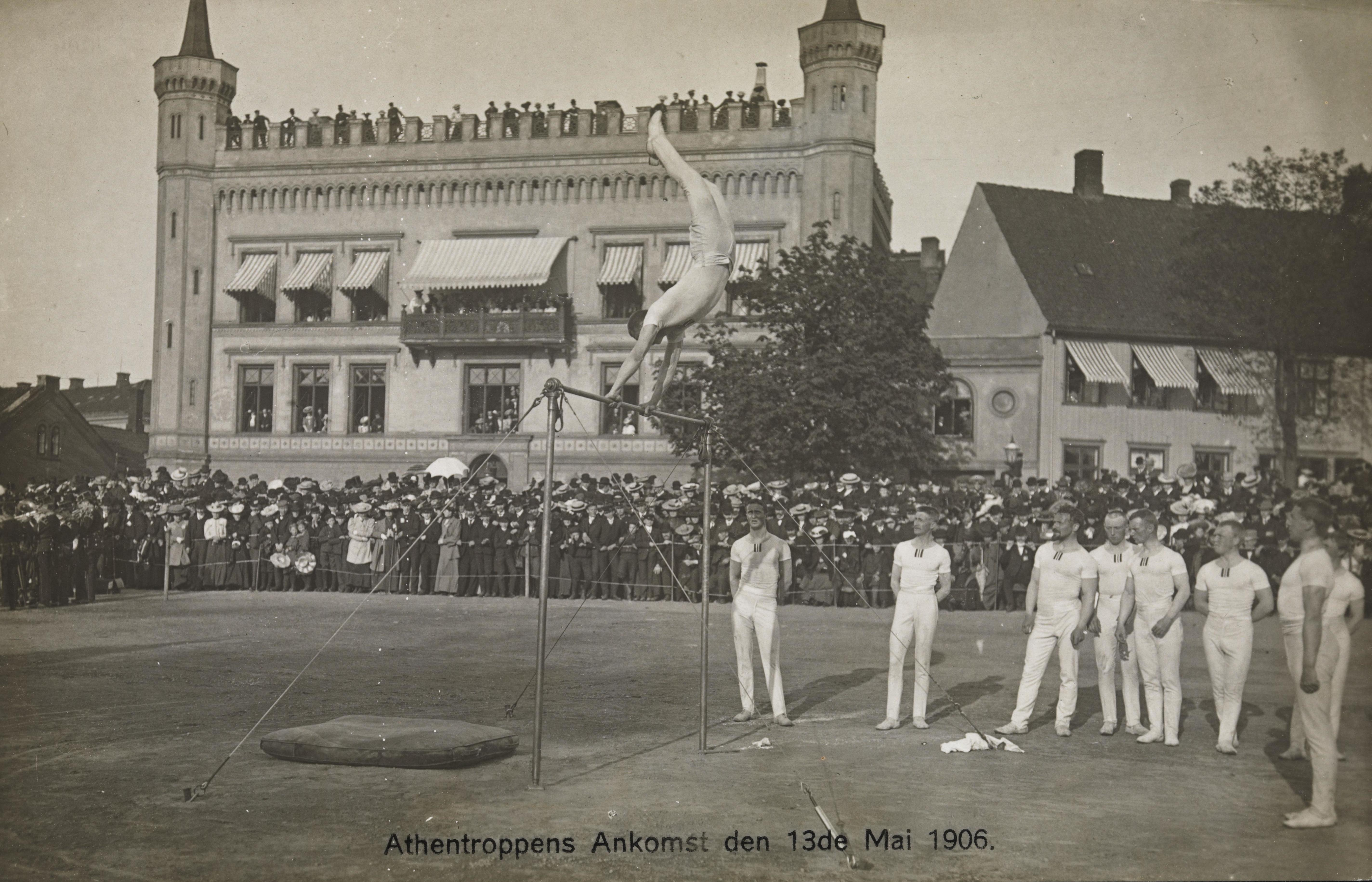 Bildet er hentet fra Nasjonalbibliotekets bildesamling Festningsplassen, Oslo, Oslo